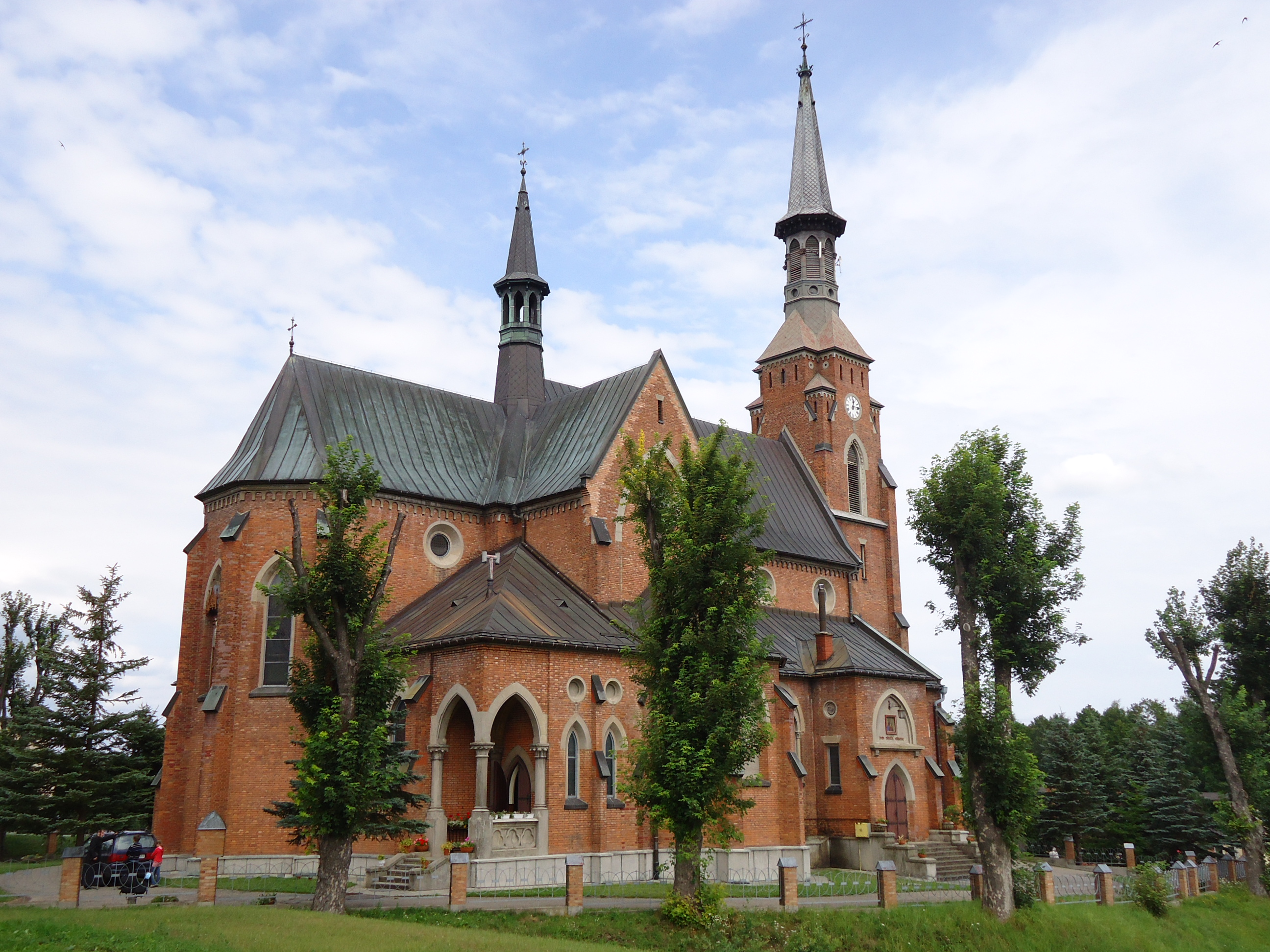 Kościół NMP Szkaplerznej Szynwałd elewacja południowa